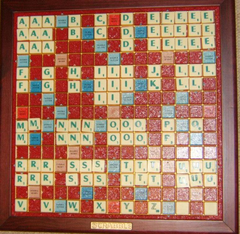 Je l'ai prise chez moi